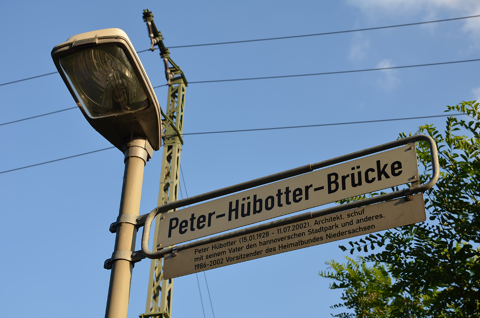 Die Legende unter dem Straßenschild der Peter-Hübotter-Brücke in Hannover erläutert: „Peter Hübotter (15.01.1928 - 11.07.2002), Architekt, schuf mit seinem Vater den hannoverschen Stadtpark und anderes. 1986-2002 Vorsitzender des Heimatbundes Niedersachsen“ ...